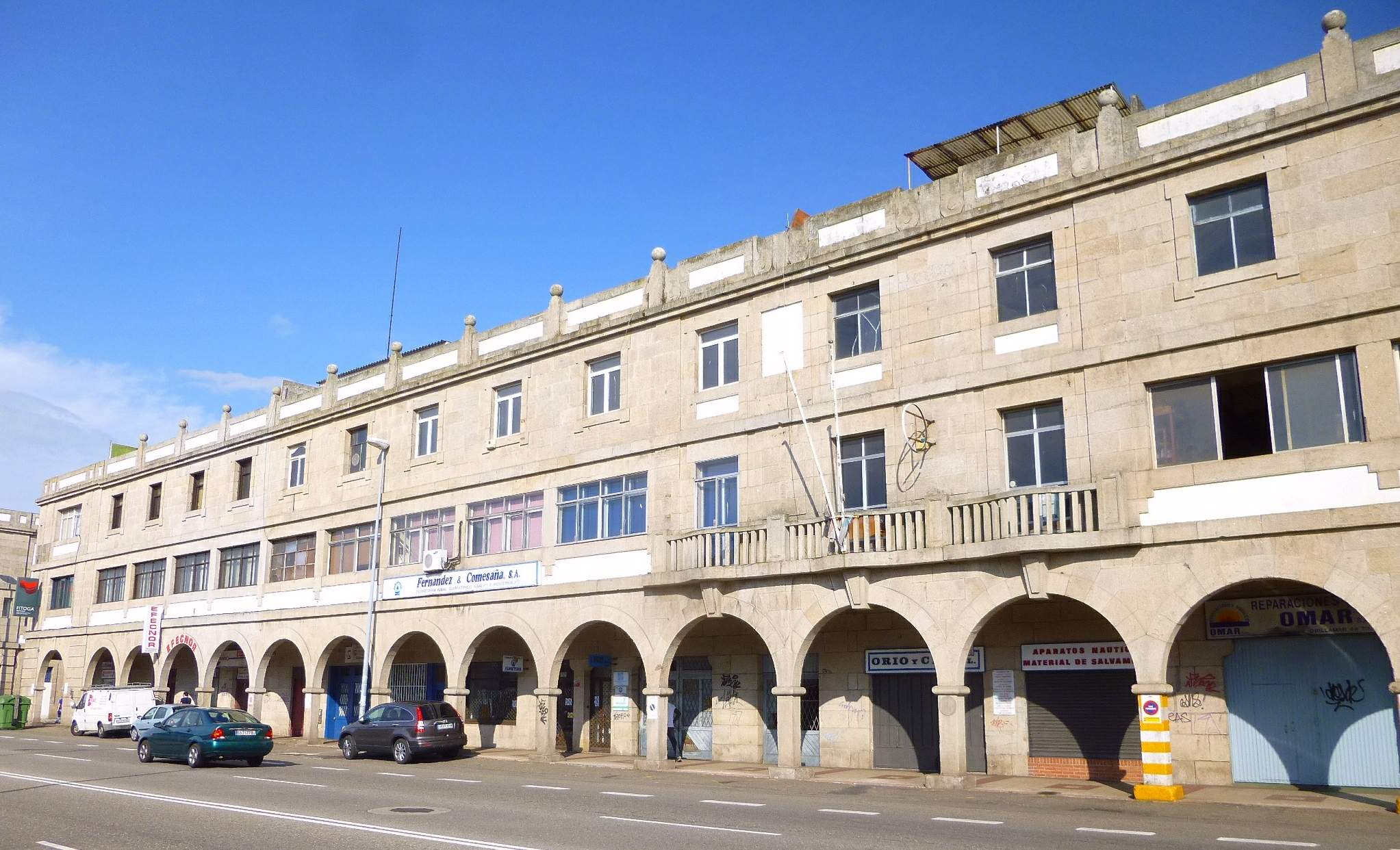 Vigo - Avenida de Beiramar, Fernández & Comesaña